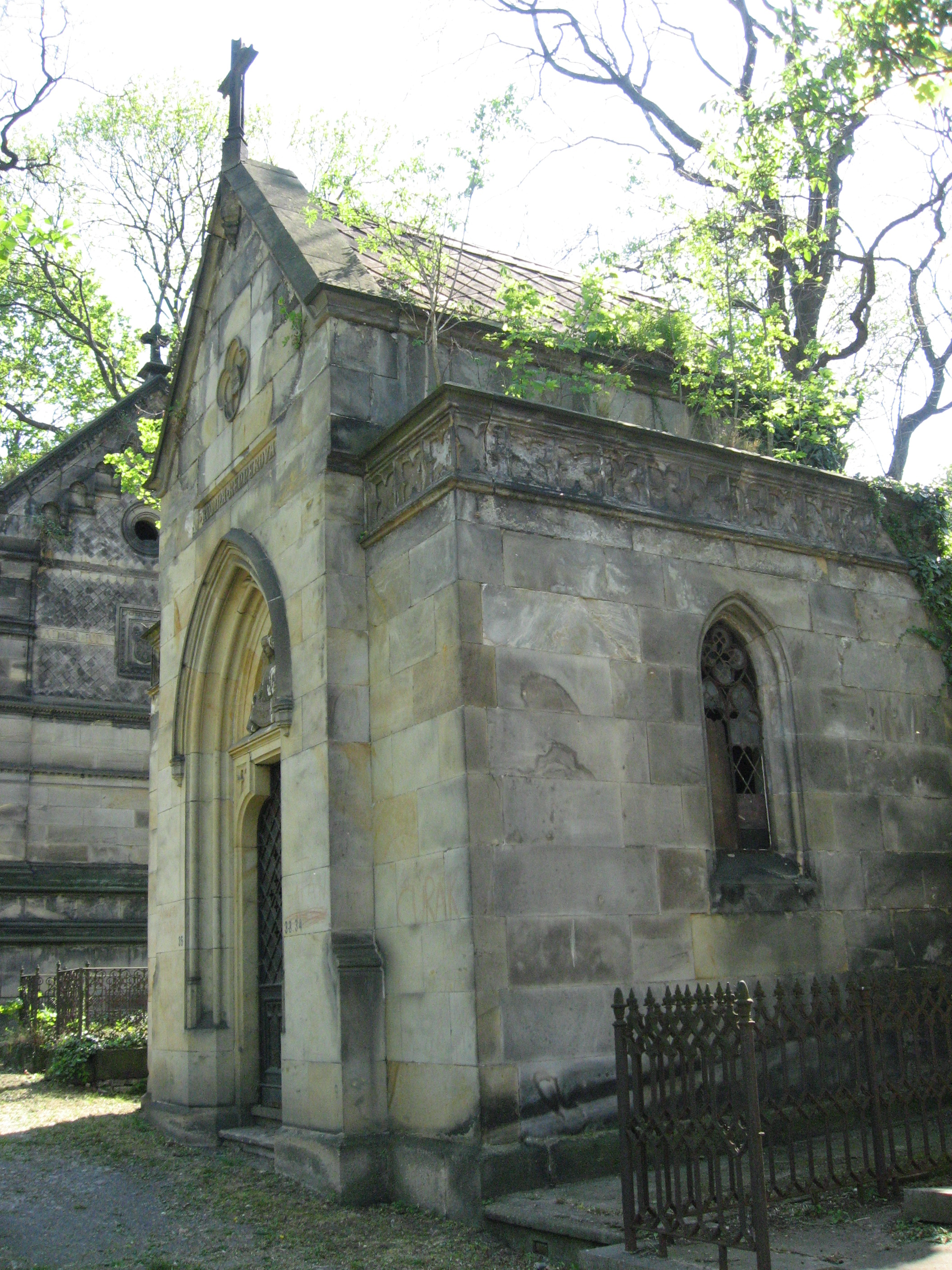 Olšanské hřbitovy